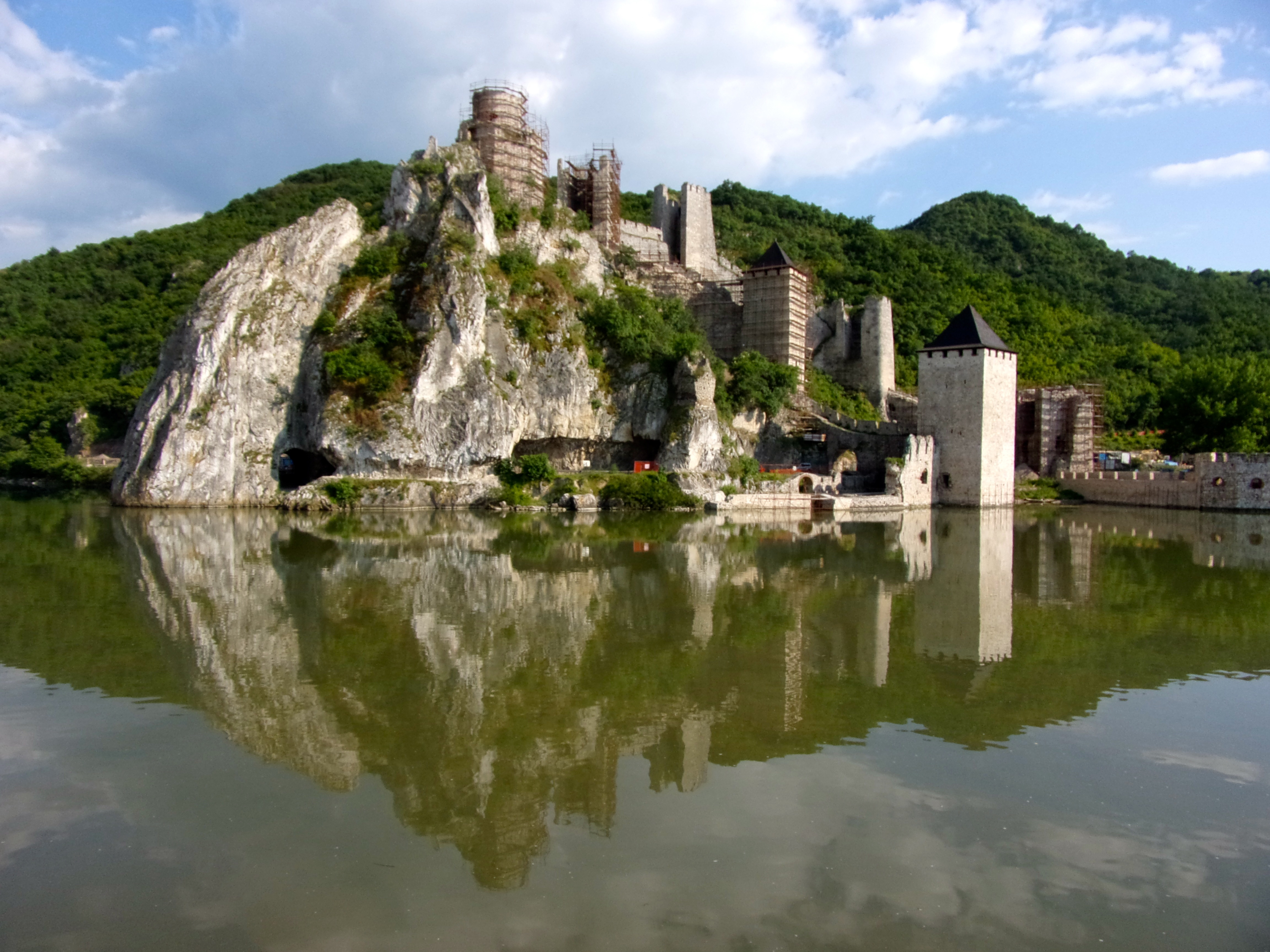 Golubac Fortress